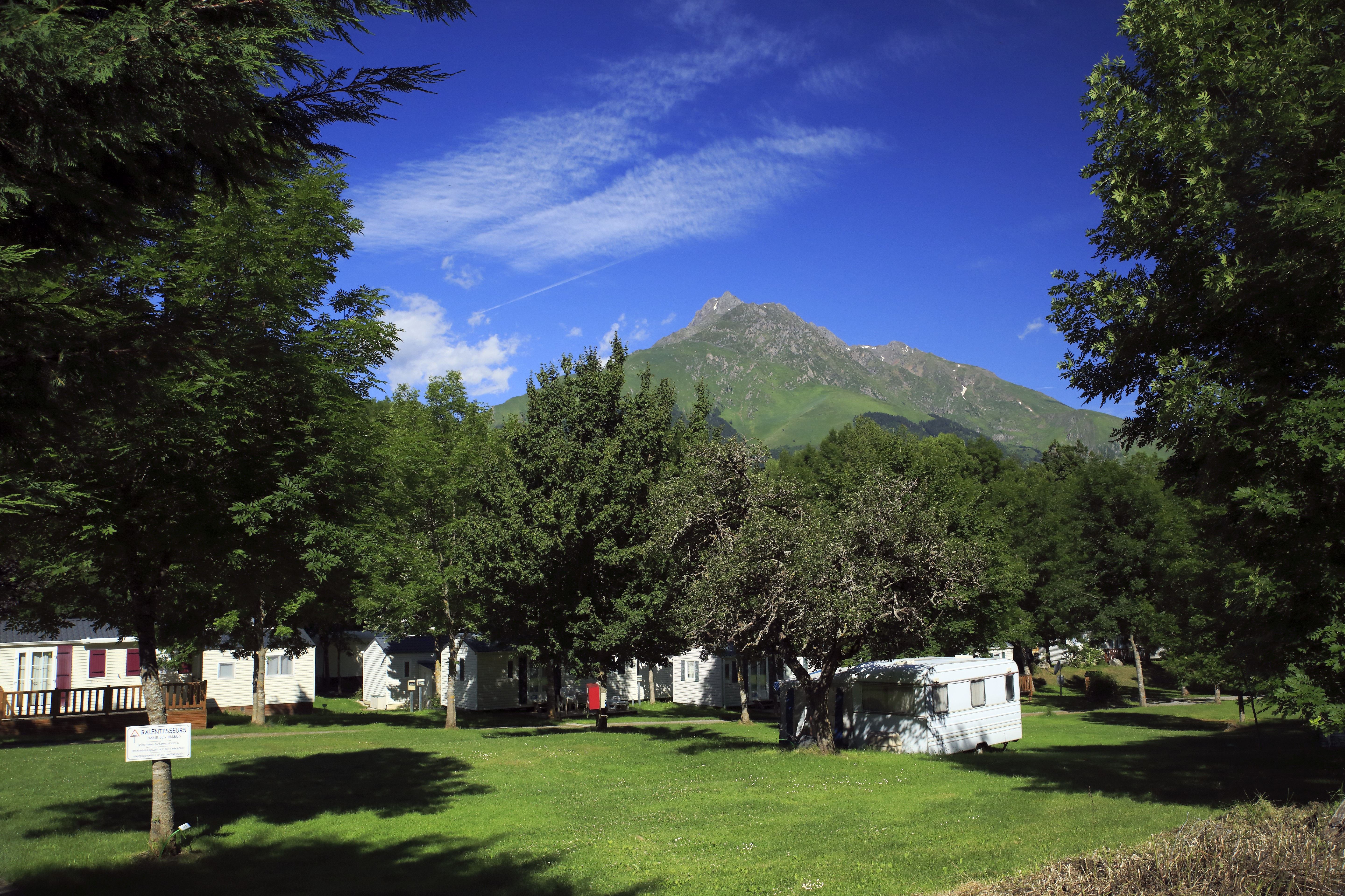 Der Zeltplatz liegt am Südende von Gouaux geschützt in einer Talmulde des Ruisseau de Val.Der Arbizon auf der anderen Seite des Valée d’Aure ist in Gouaux ziemlich dominant.